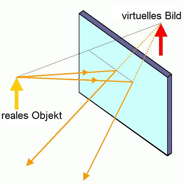 Miroir plan Jean-Jacques MILAN 20:38, 19 August 2005 (UTC)